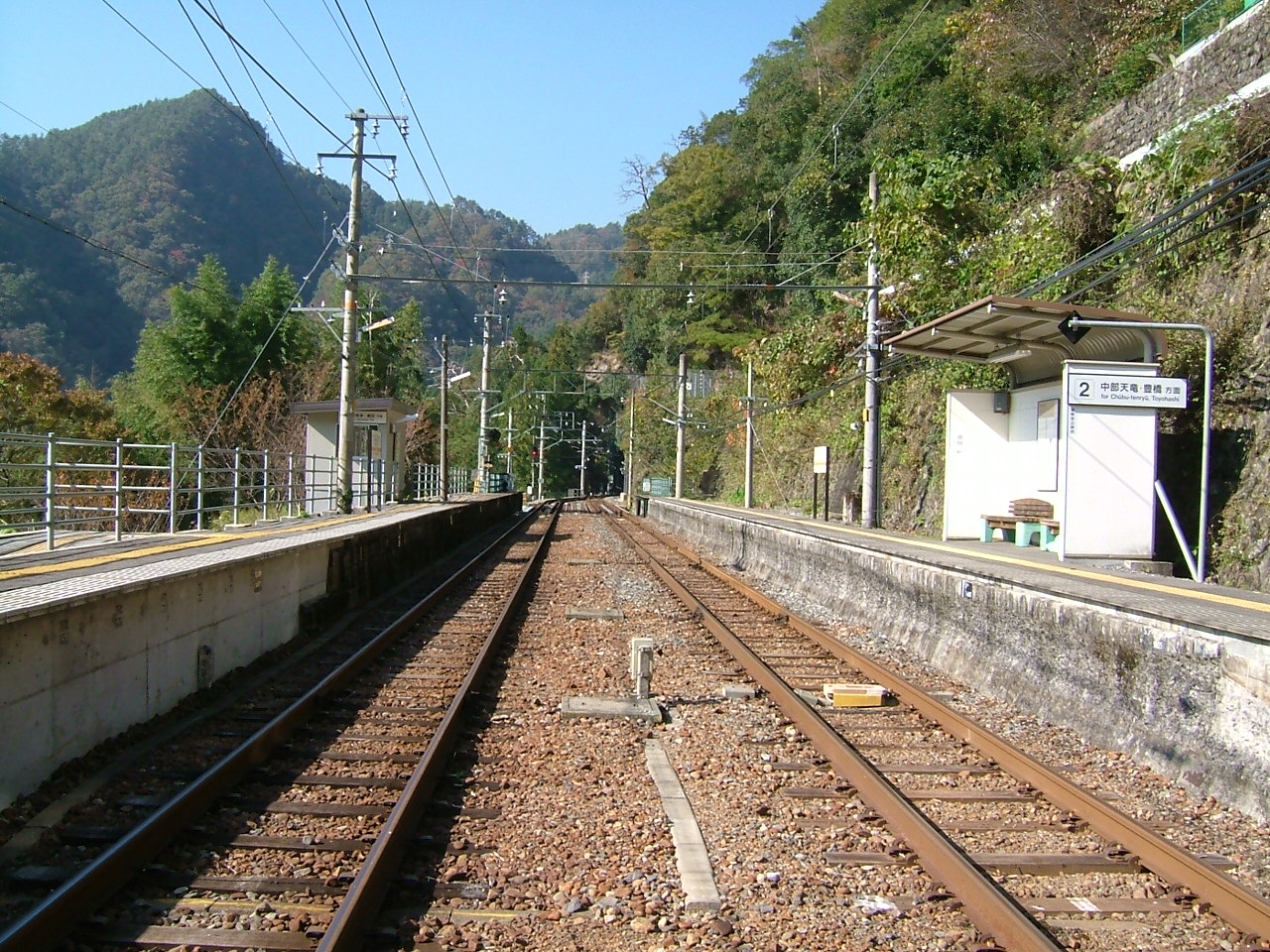 伊那小沢駅構内踏切より 自分の撮影